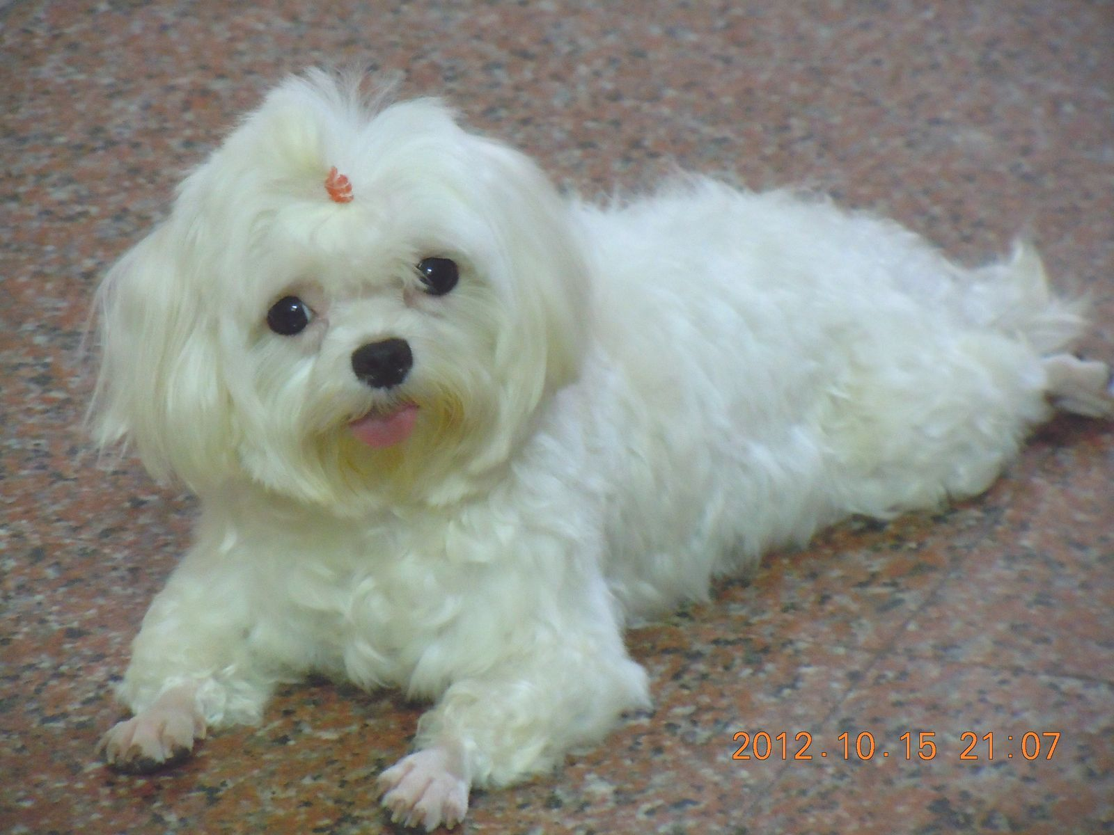 中文（台灣）: 馬爾濟斯是一種白色長毛的小型賞玩犬，外觀溫柔可愛，性格撒嬌好客。